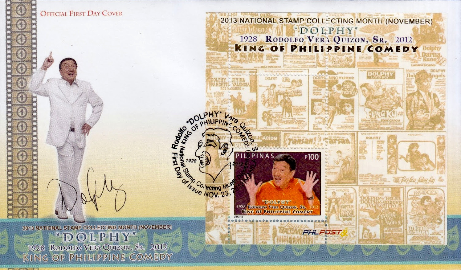 Rodolfo Vera Quizon (Dolphy)